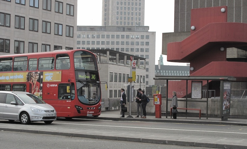 Мостът "Ватерло". Южната стълба излиза на моста. Ясно се вижда отношението и с автобусната спирка.